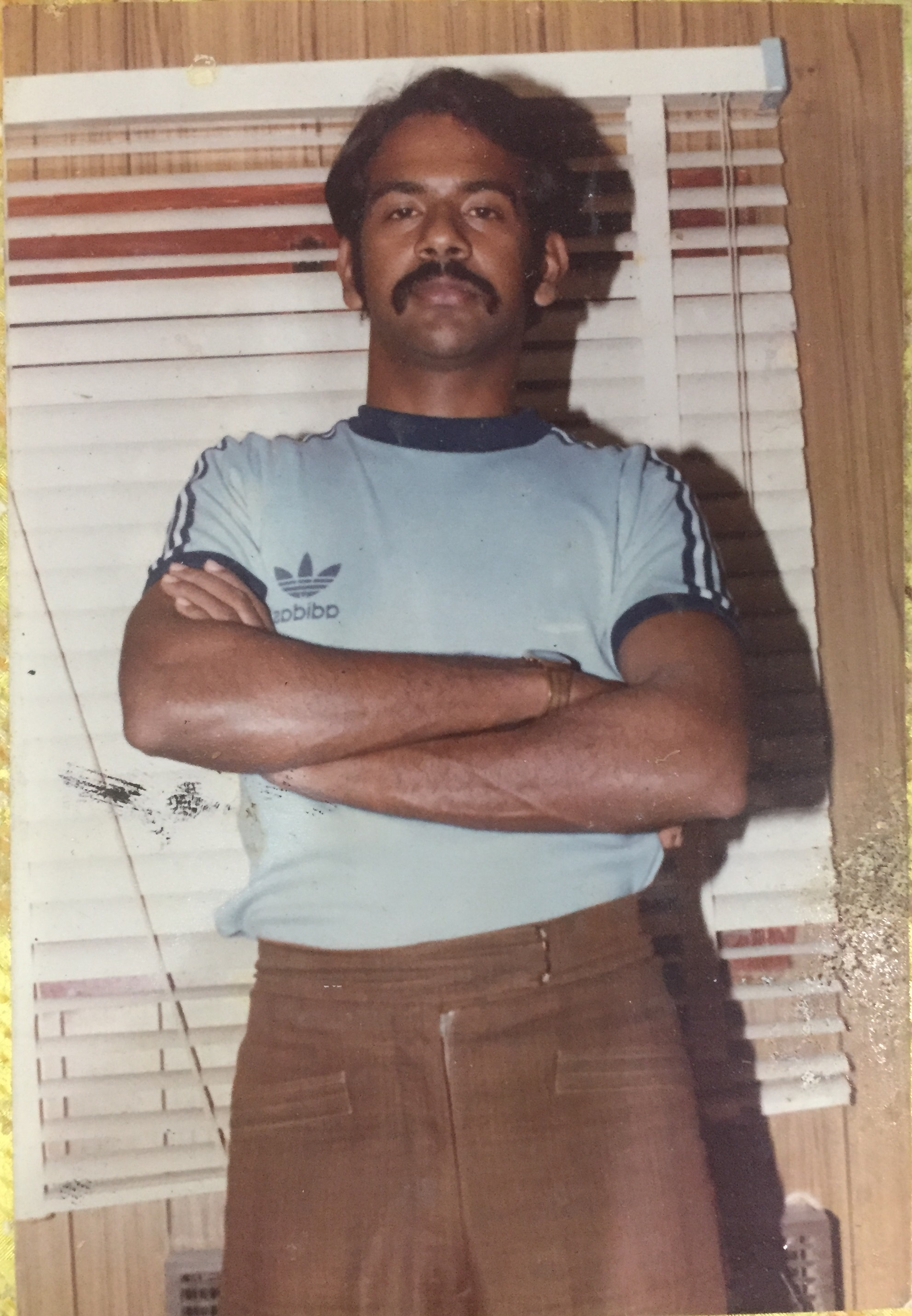 മാണി സി കാപ്പൻ കോളേജ് പഠനകാലത്ത്